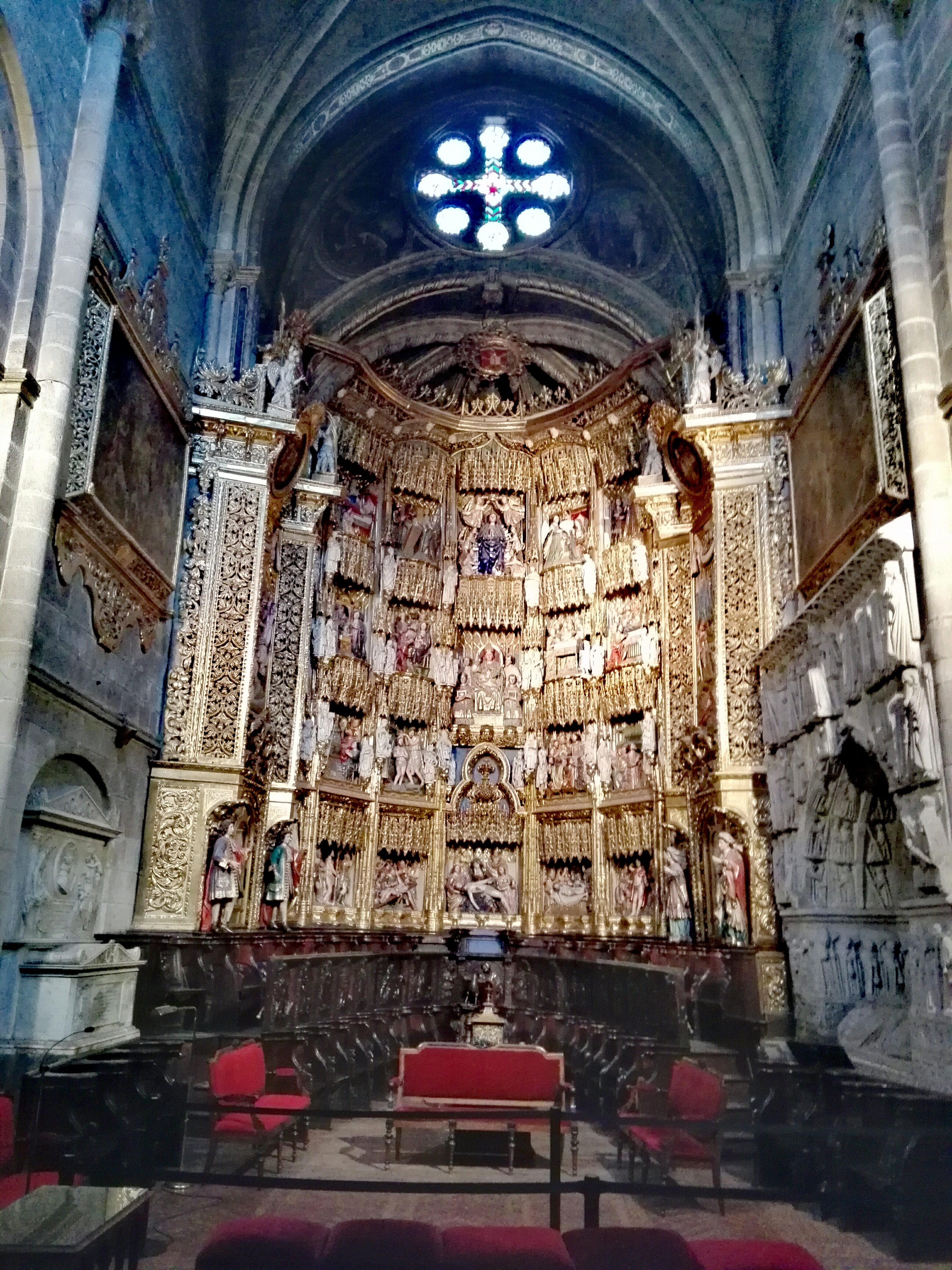 Altar Mayor y su Retablo Gótico